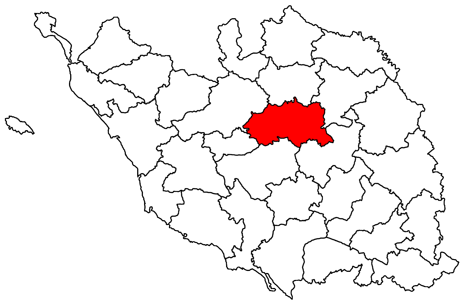 Le canton des Essarts dans le découpage cantonal vendéen de 1973.